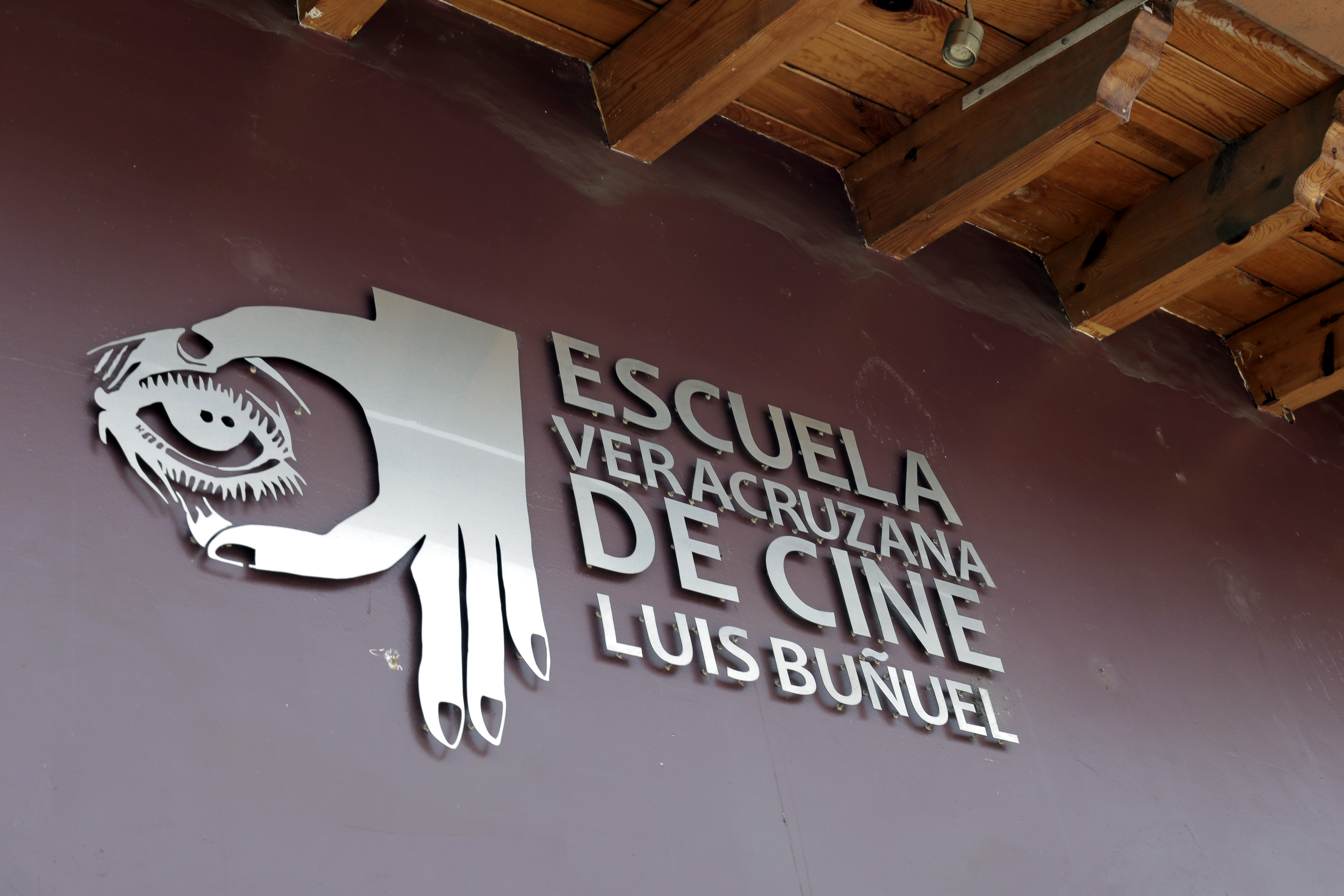 Festival Ambulante. Charla: Sobre el programa de documentales del Sundance Documentary Fund. Escuela Veracruzana de Cine Luis Buñuel / 24 de Mayo. Fotografía: Ernesto Vargas. Imagen realizada con equipo R7D.